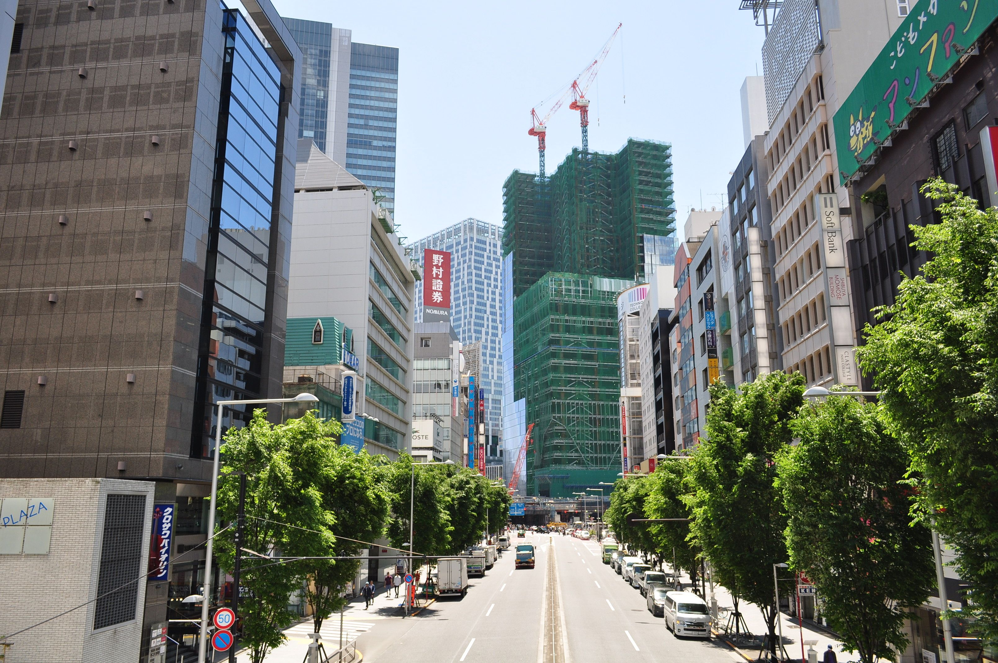 明治通り 宮下公園交差点